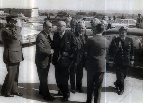 Gustavo Lorca, junto a Jorge Alessandri Rodríguez.